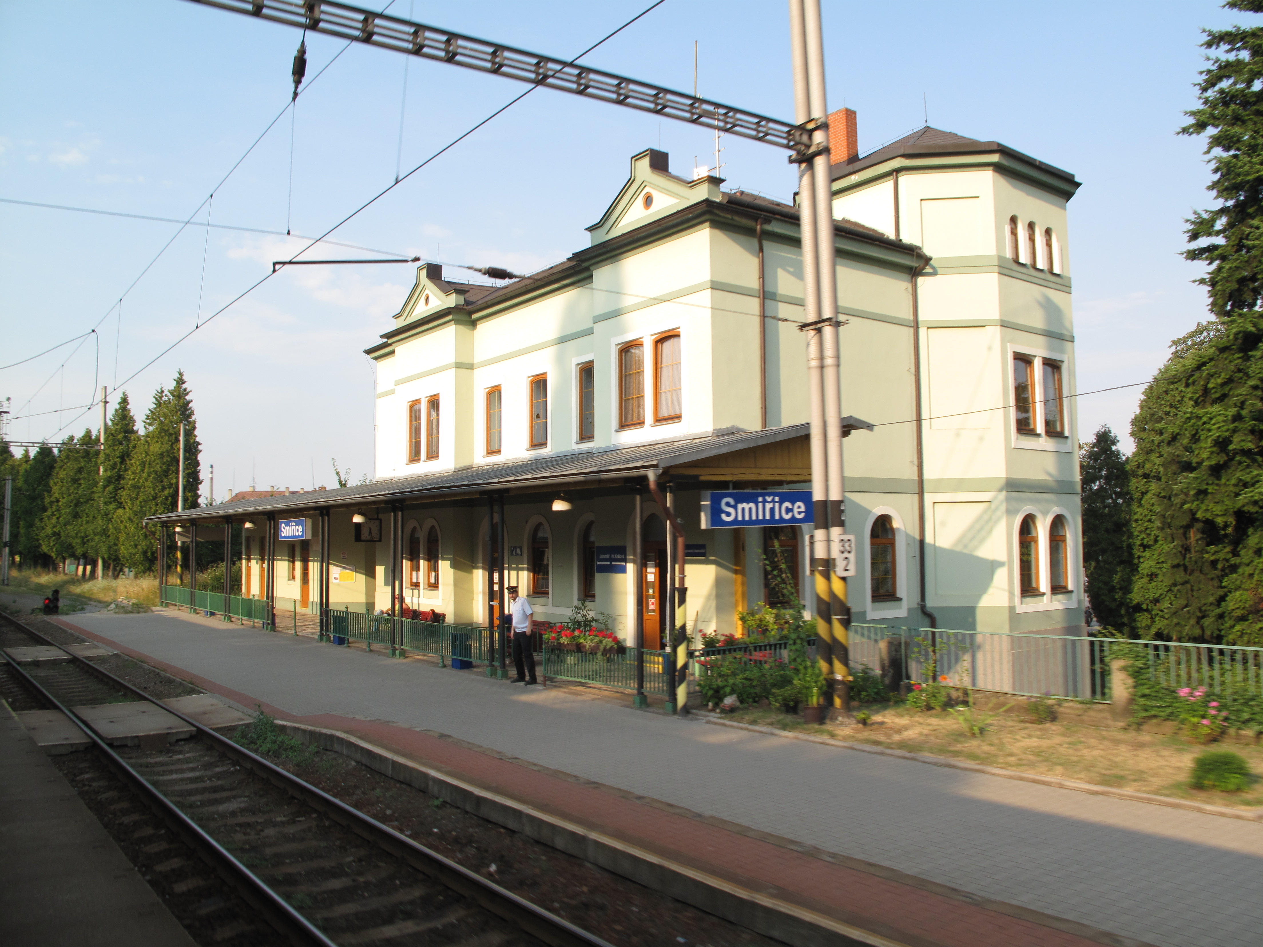 Smiřice, železniční zastávka